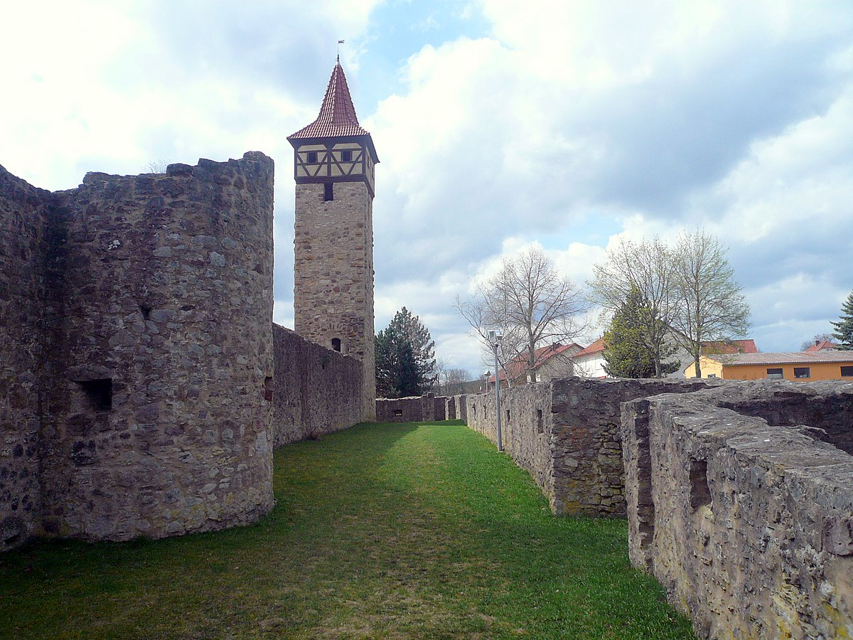 Kirchenburg Ostheim, Achtlöchriger Turm